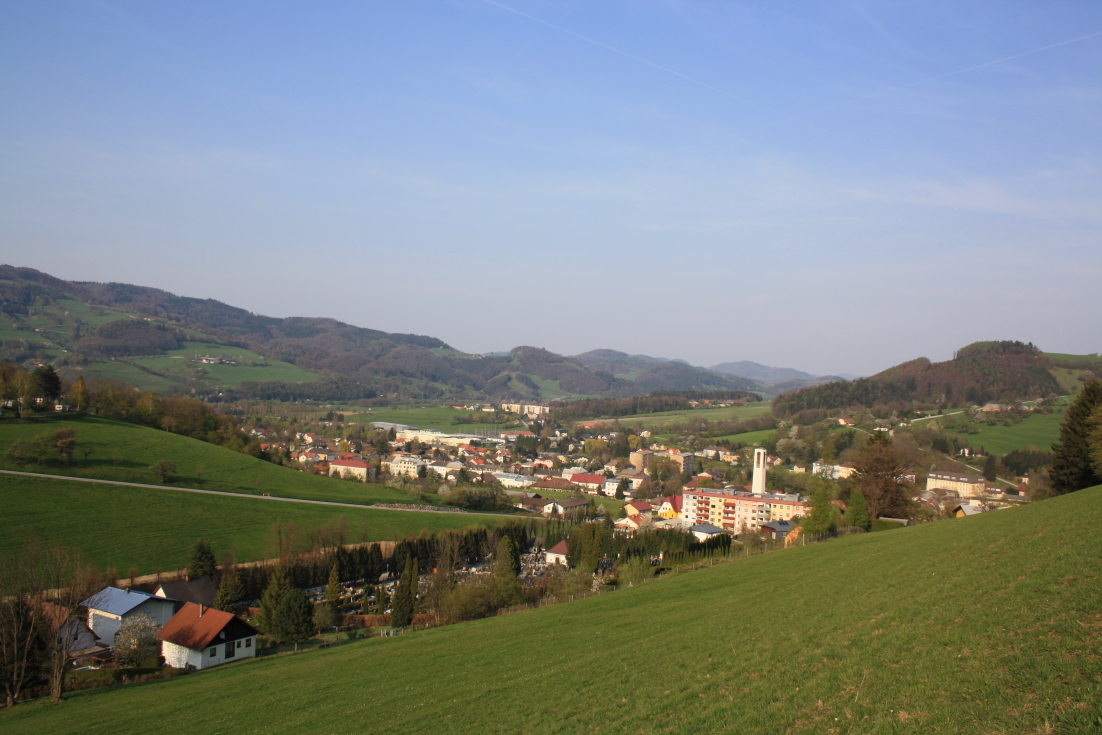 Die niederösterreichische Gemeinde Traisen von Westen gesehen.